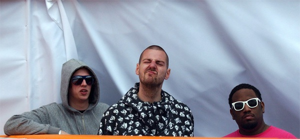 De Jeugd van Tegenwoordig (Nederlandse rapformatie)